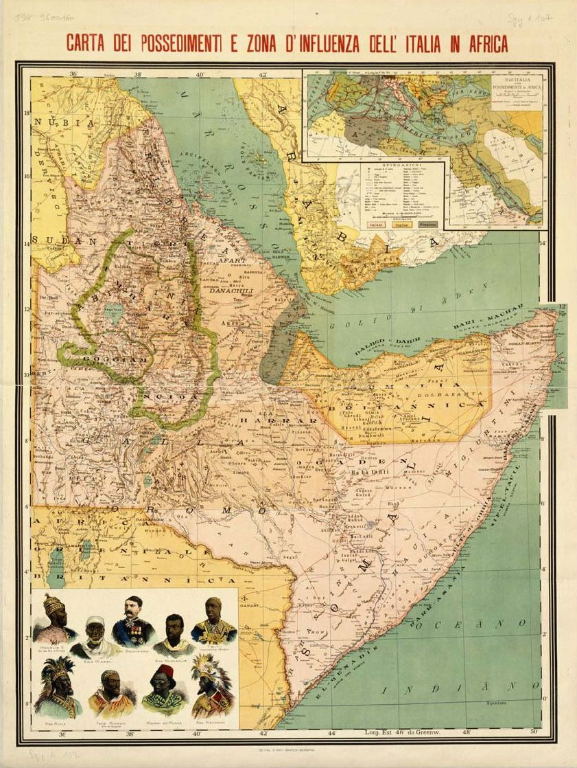 Carta dei possedimenti e zona d'influenza dell'Italia in Africa